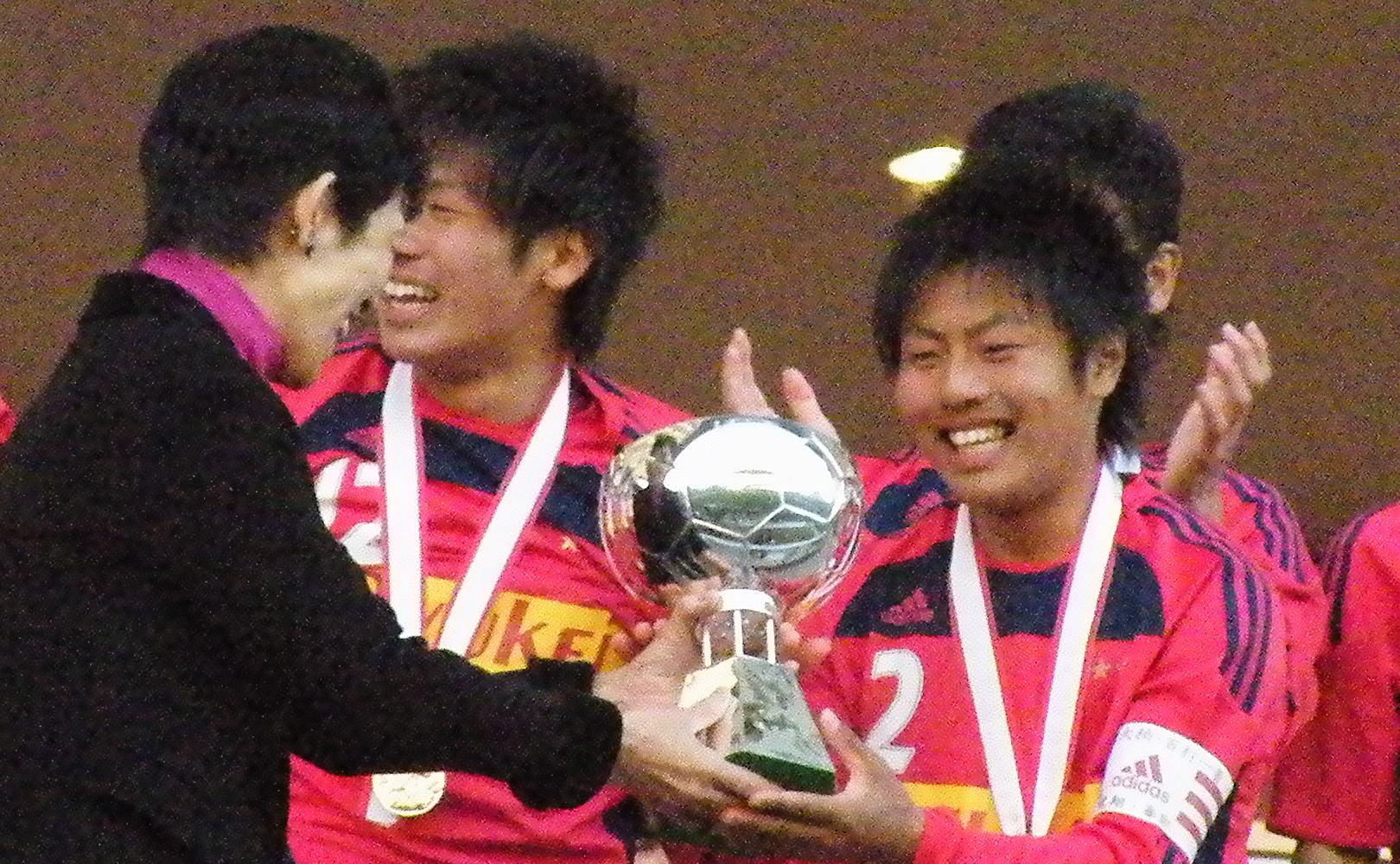 高円宮杯U-18サッカーリーグ2013チャンピオンシップにて、優勝チームのキャプテンに高円宮杯を授与する場面。左は高円宮妃久子殿下。右は流経柏高校の石田和希キャプテン。